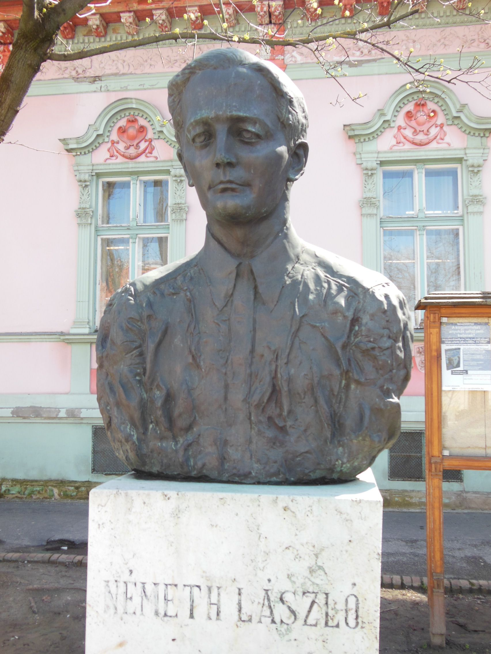 Németh László mellszobra, 1976, Tóth Valéria (Hódmezővásárhely, Andrássy út 44., Városi Könyvtár)